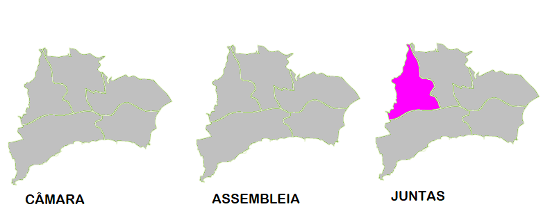 Mapa ilustrativo do partido mais votado por freguesia em Oeiras